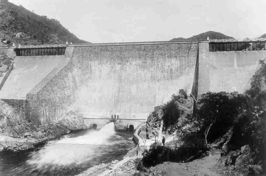 Antiguo Paredon Lago San Roque Hecho Por Carlos Cassaffousth